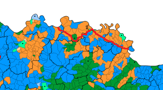 Granice Posavine po Daytonskom sporazumu